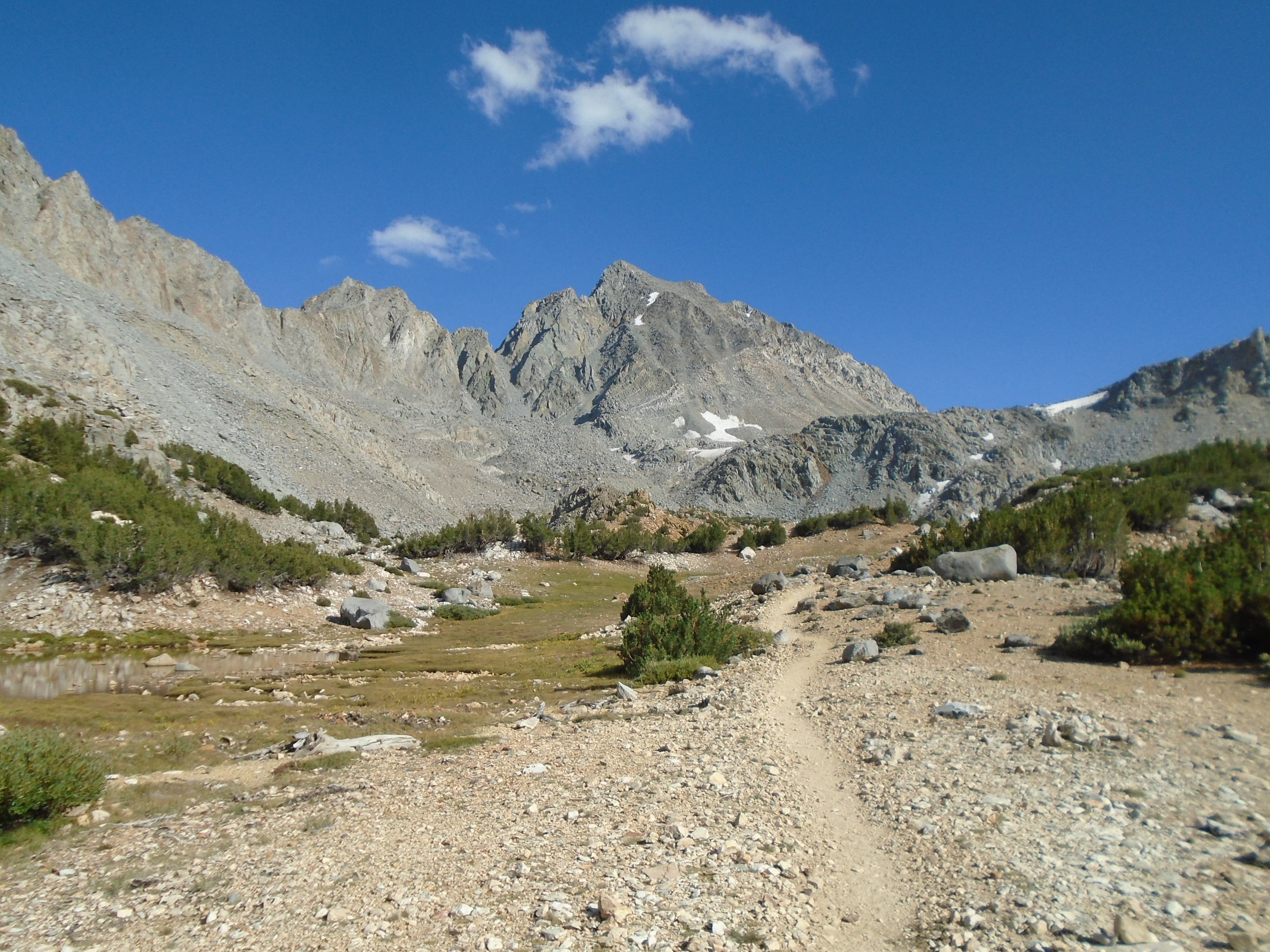 Mount Agassiz (13 899 ft, 4 236 m) and Bishop Pass Trail